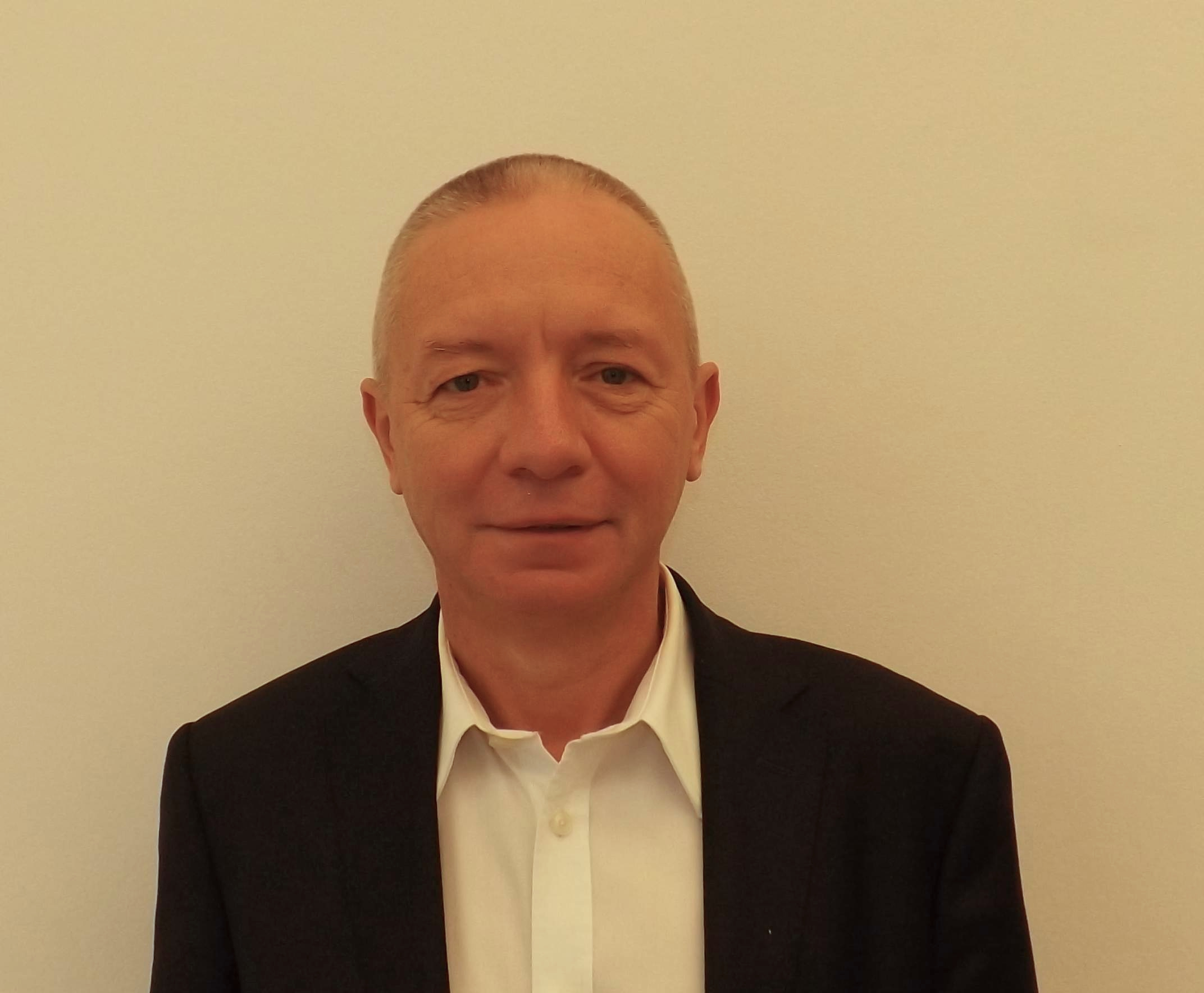 Wincenty Elsner, poseł Twojego Ruchu